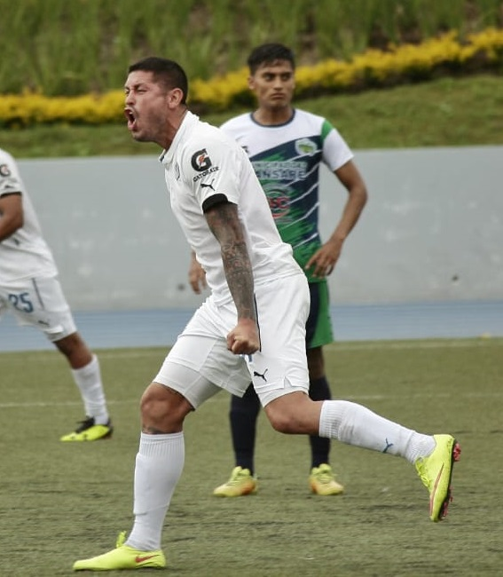 Paulo Centurión festejando a todo pulmón su primer tanto en Cremas B